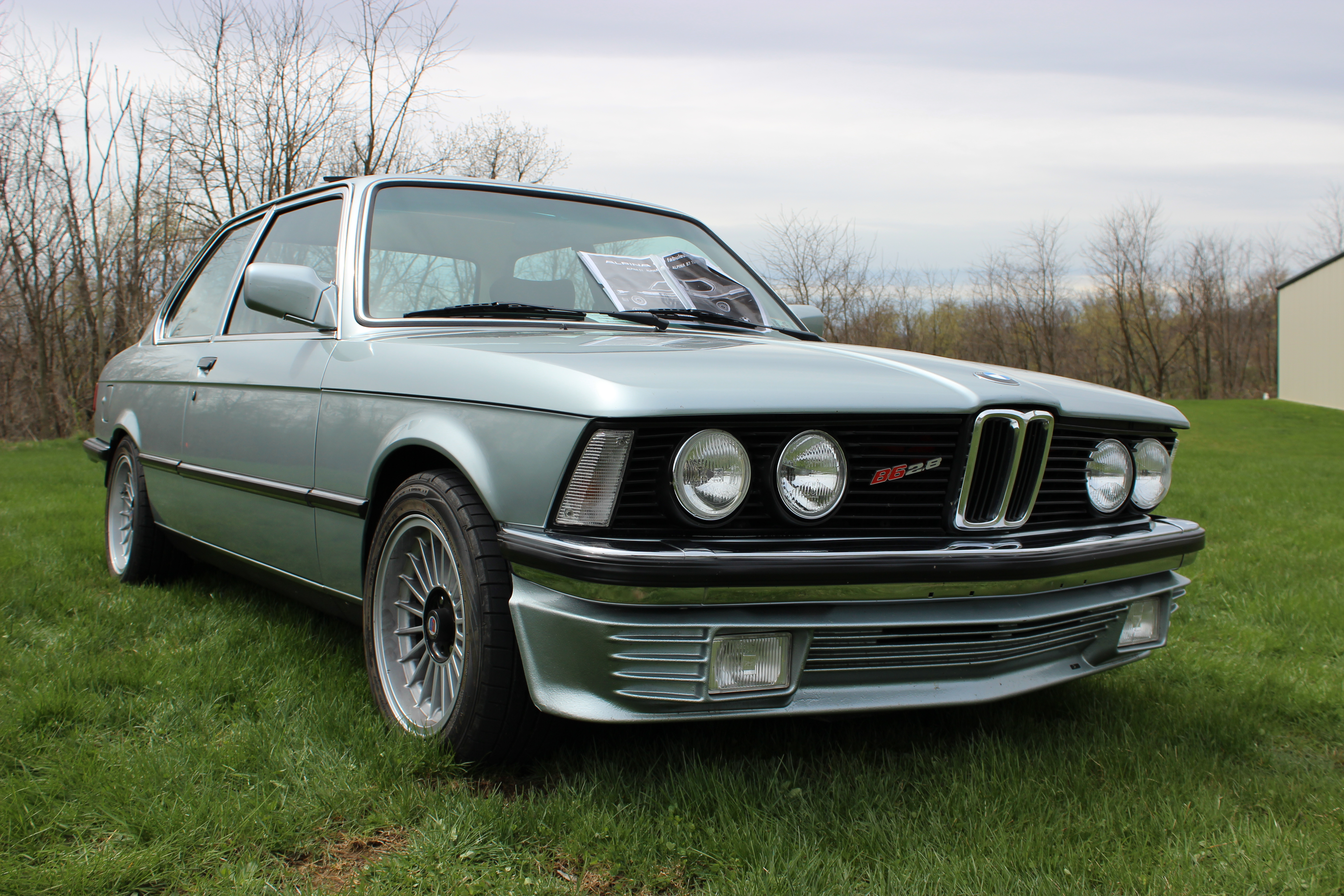 Alpina B6 2.8